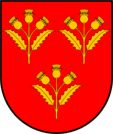 Arma dei duchi di Cardona